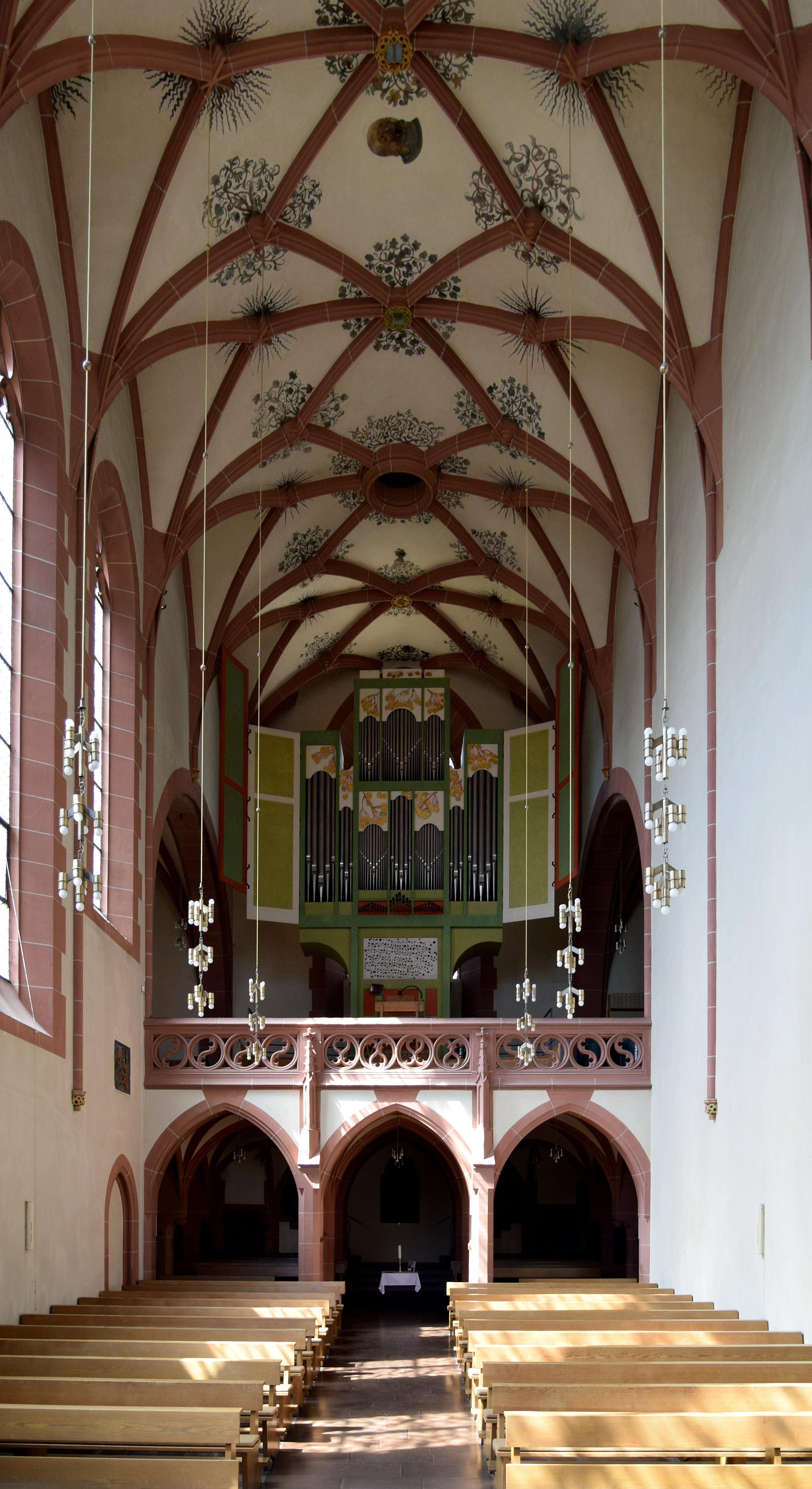 Interieur von St. Johannes Evangelist ("Kugelkirche") in Marburg